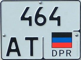 Номер ДНР (прицеп)